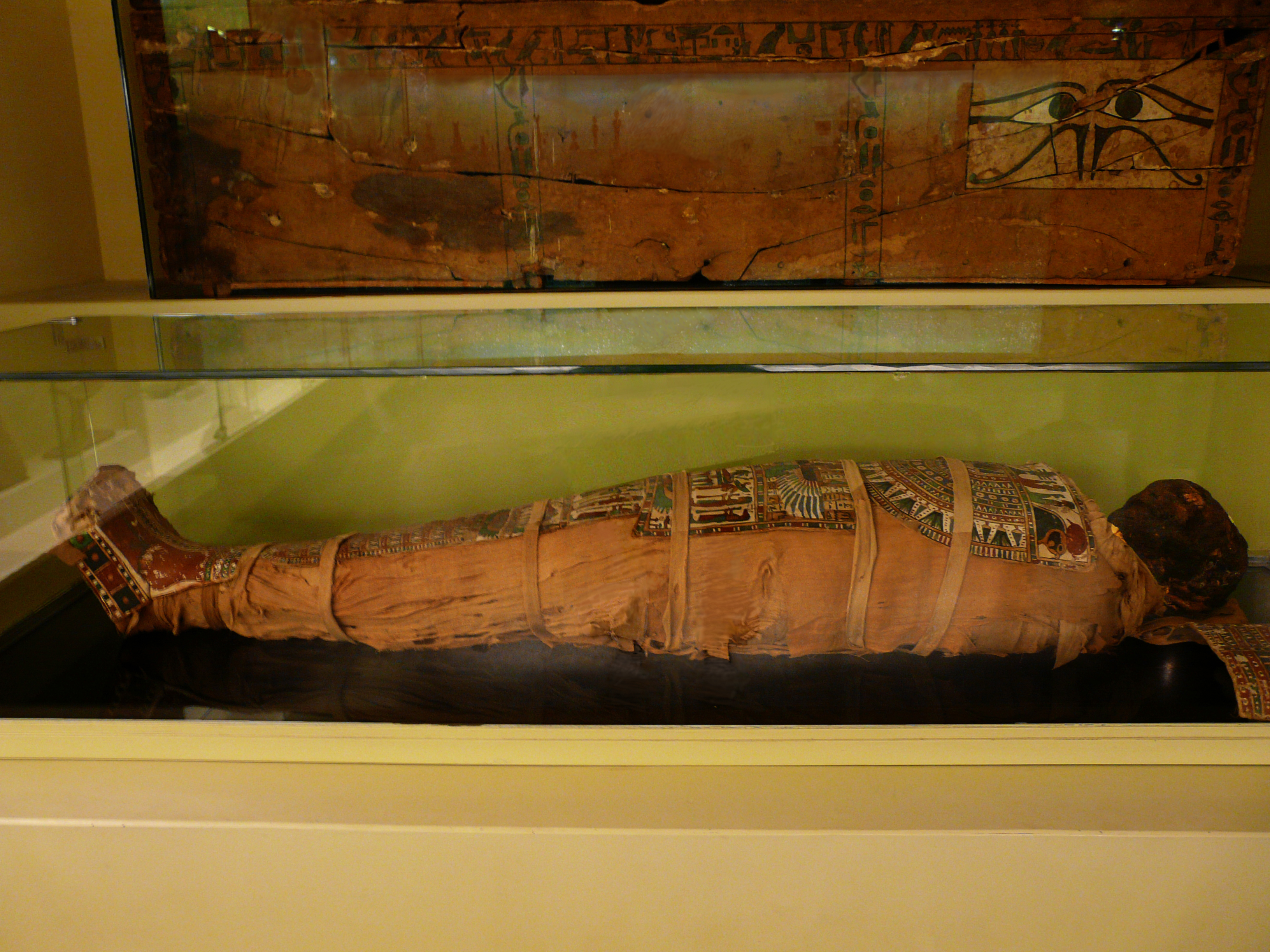 Мумия